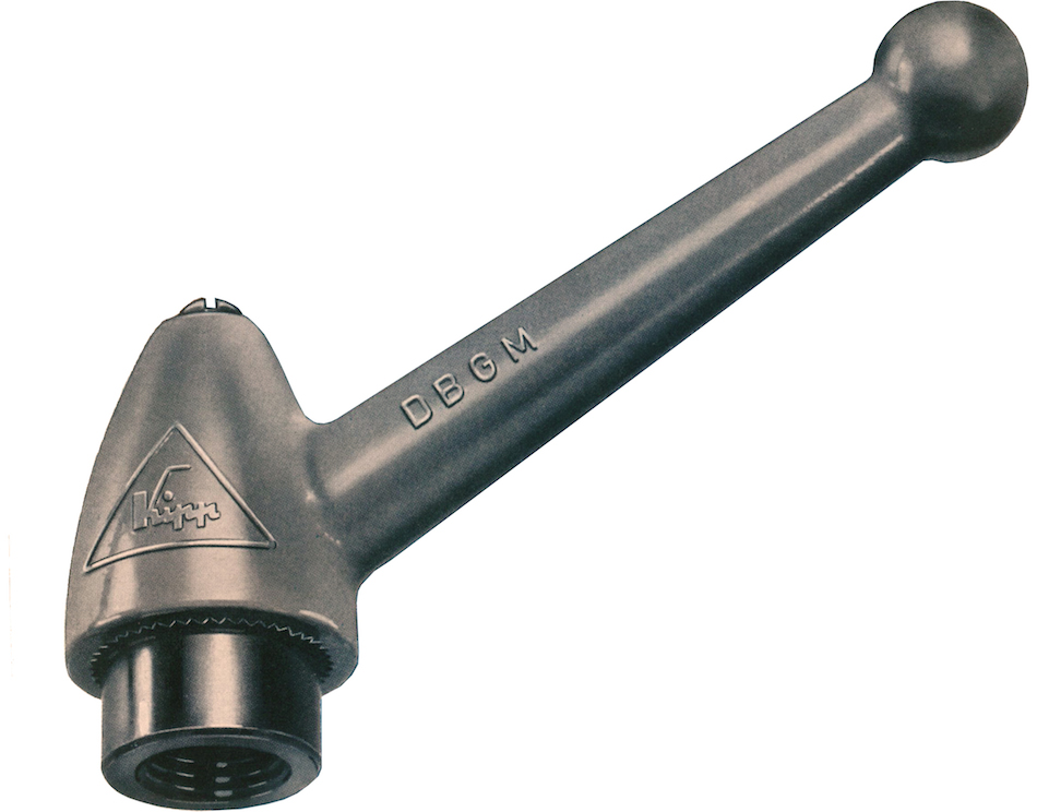 Klemmhebel (Hersteller: Heinrich Kipp Werk) - Klemmhebel bestehen aus einem Griffhebel, in den ein Einsatz mit Innengewinde oder Außengewinde eingebracht ist.